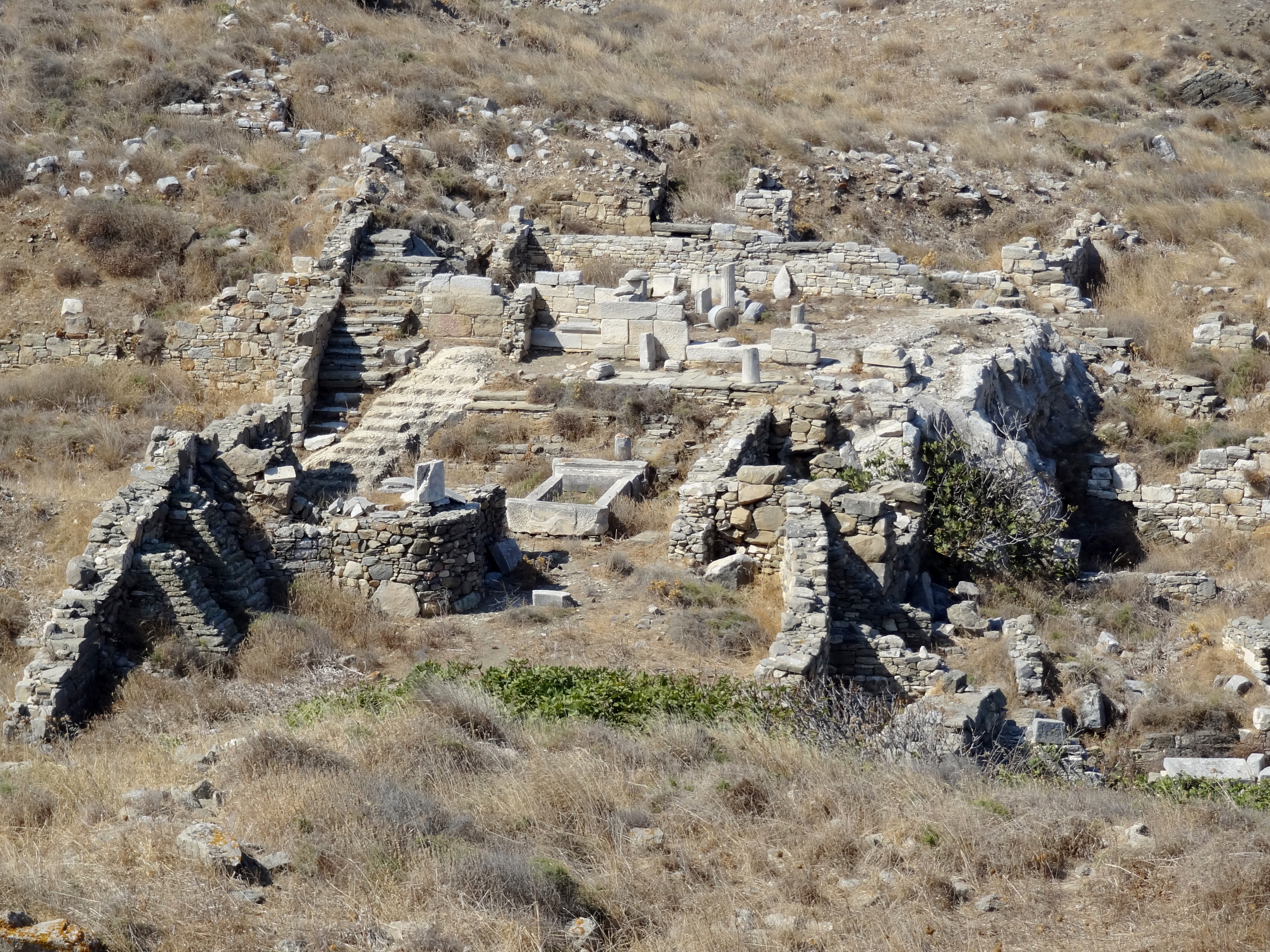 Samothrakeion in der Ausgrabungsstätte von Delos, Kykladen, Griechenland